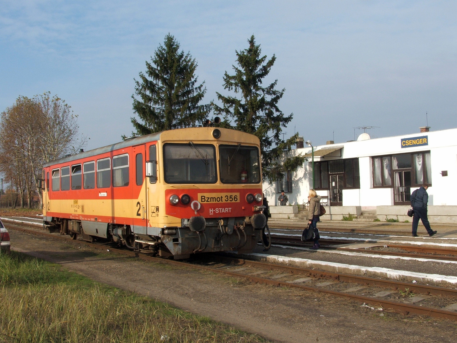 Bzmot motorvonat Csenger állomáson.